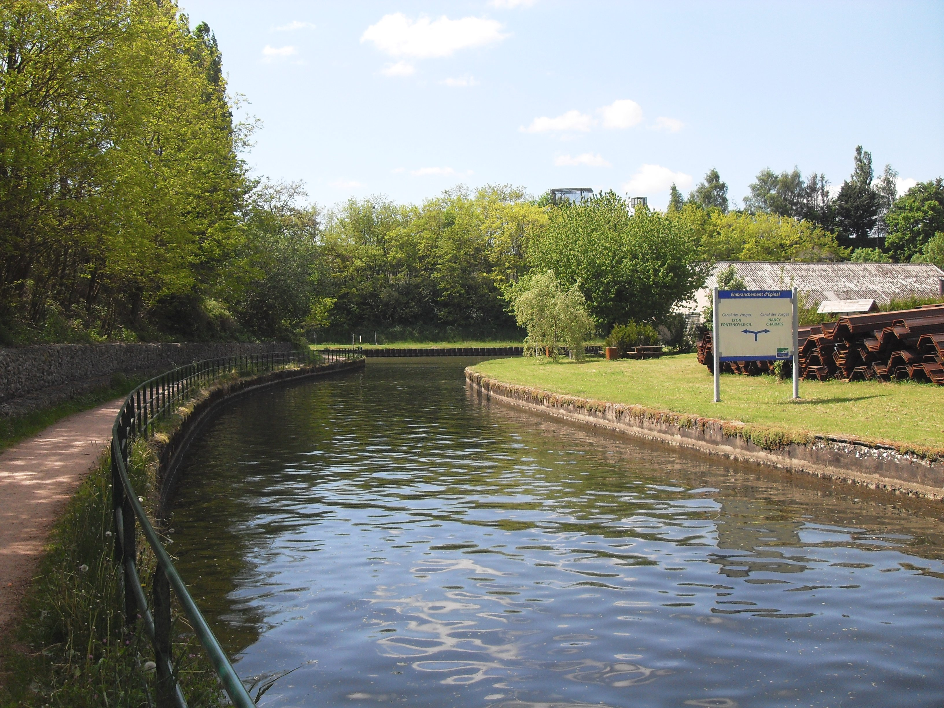 La bifurcation du Canal des Vosges pour l’embranchement d’Epinal à Golbey